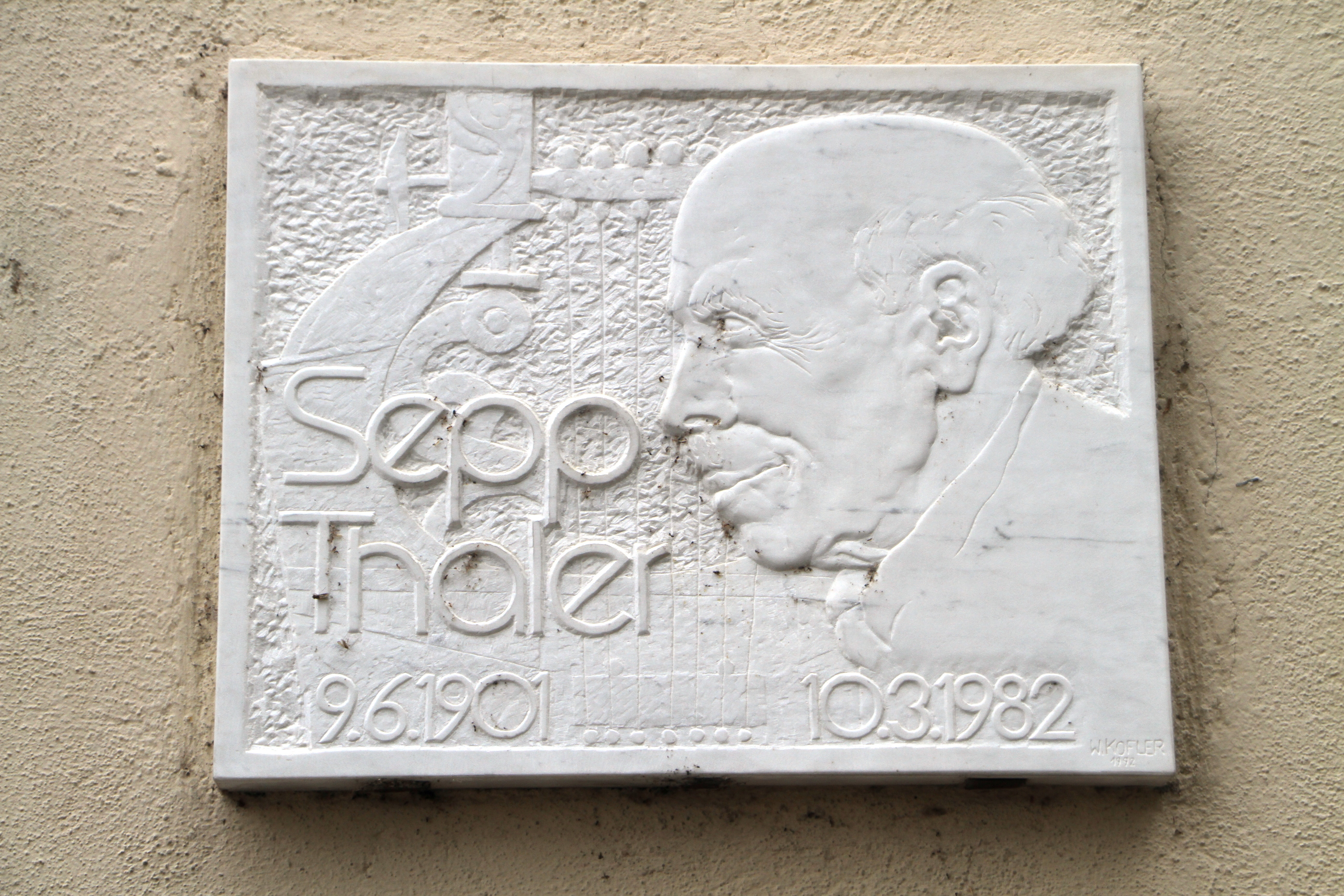 Gedenktafel für Sepp Thaler in Auer, signiert mit W.KOFLER 1992